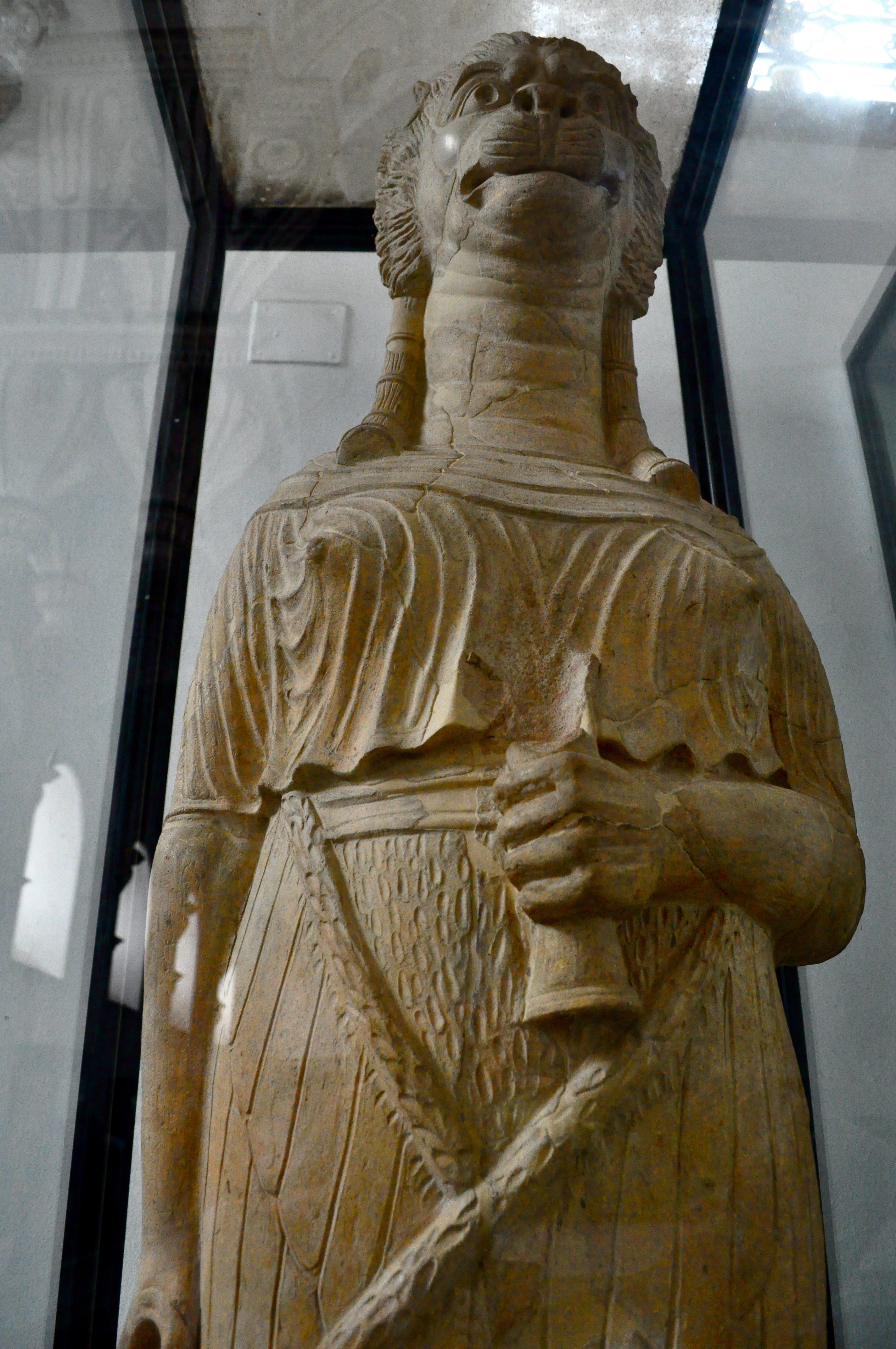 Tanit léontocéphale